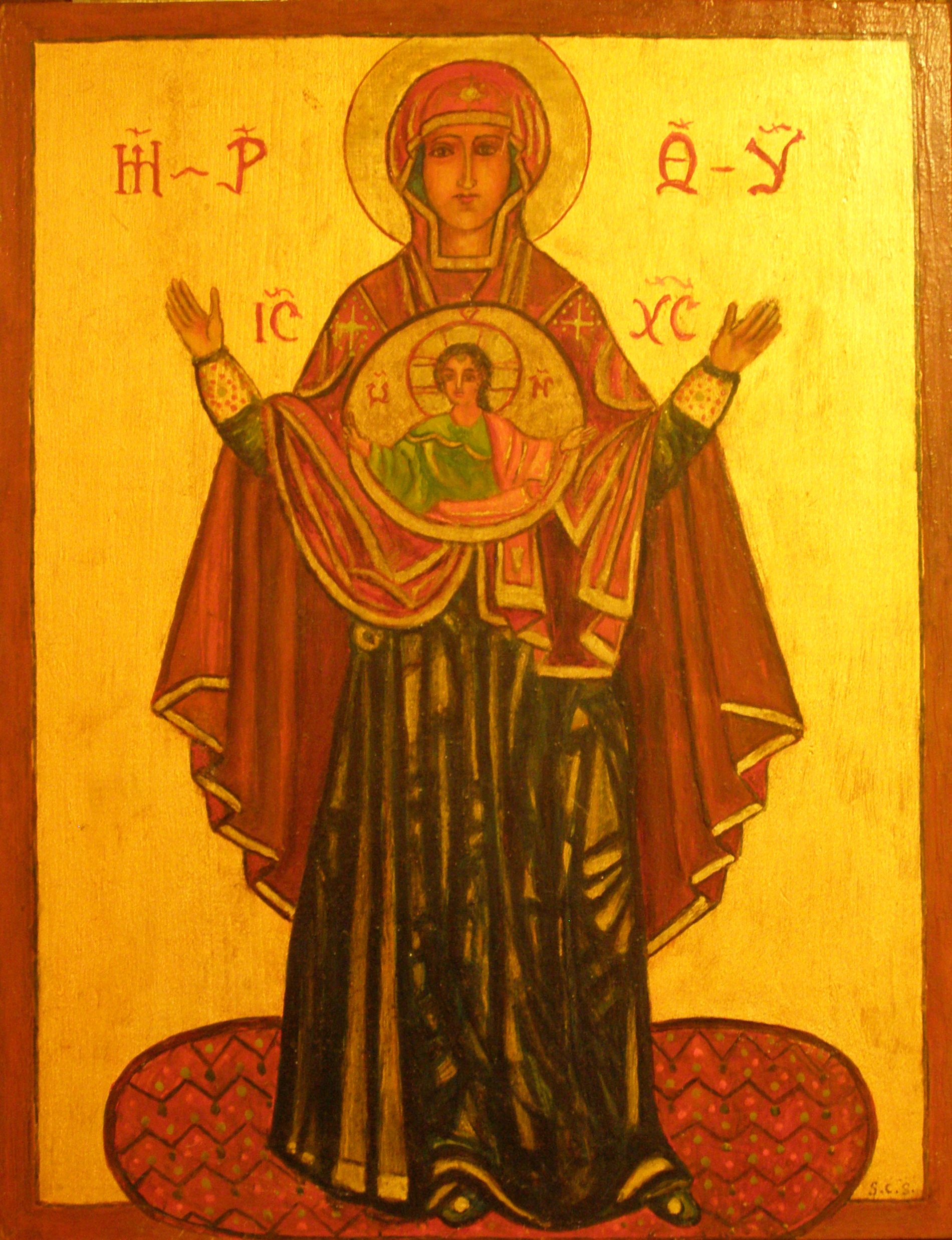 Zawsze Dziewica (Aiparthenos) - ikona w typie oranta (szkoła jarosławska)